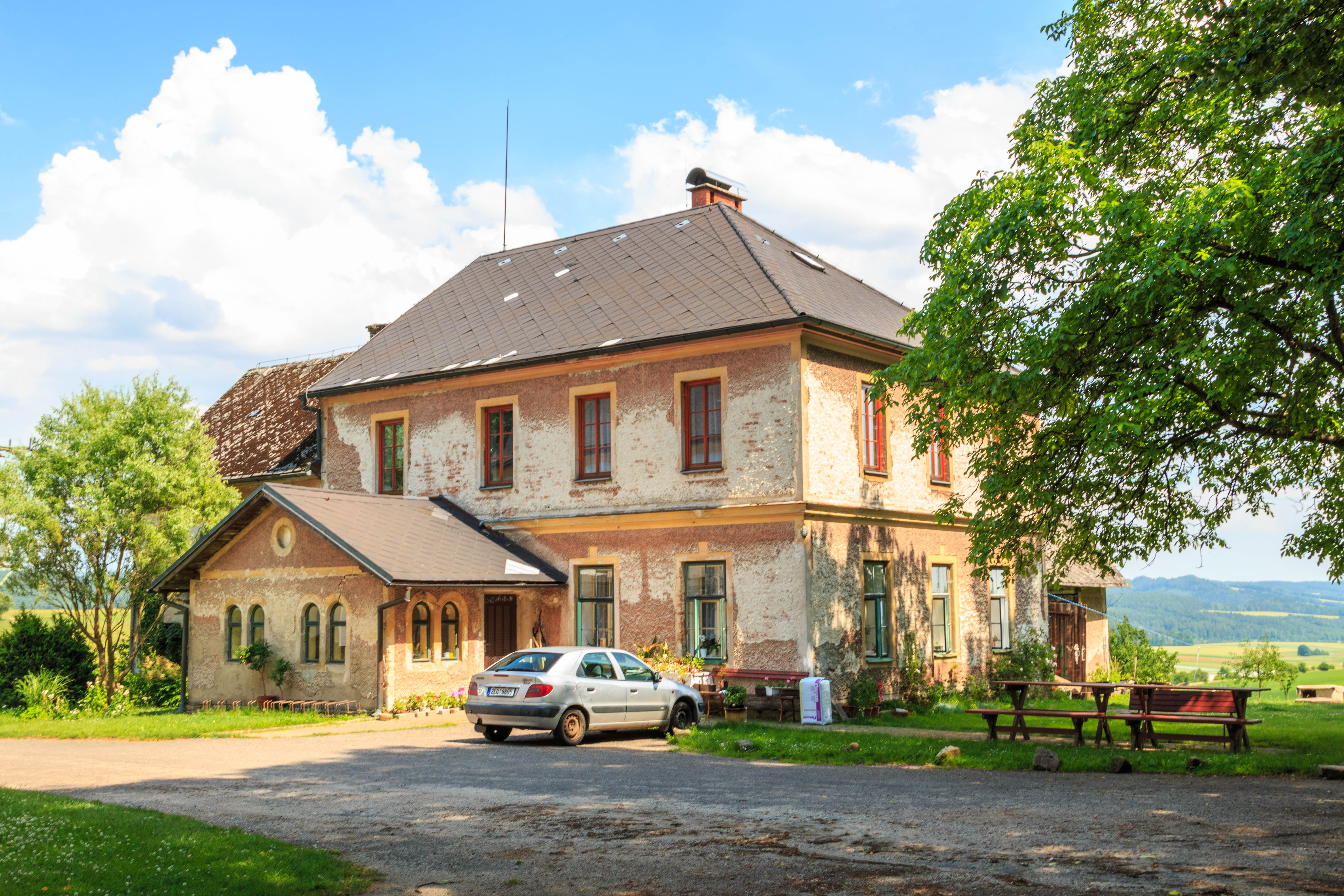 Mariánská hora - bývalý hostinec